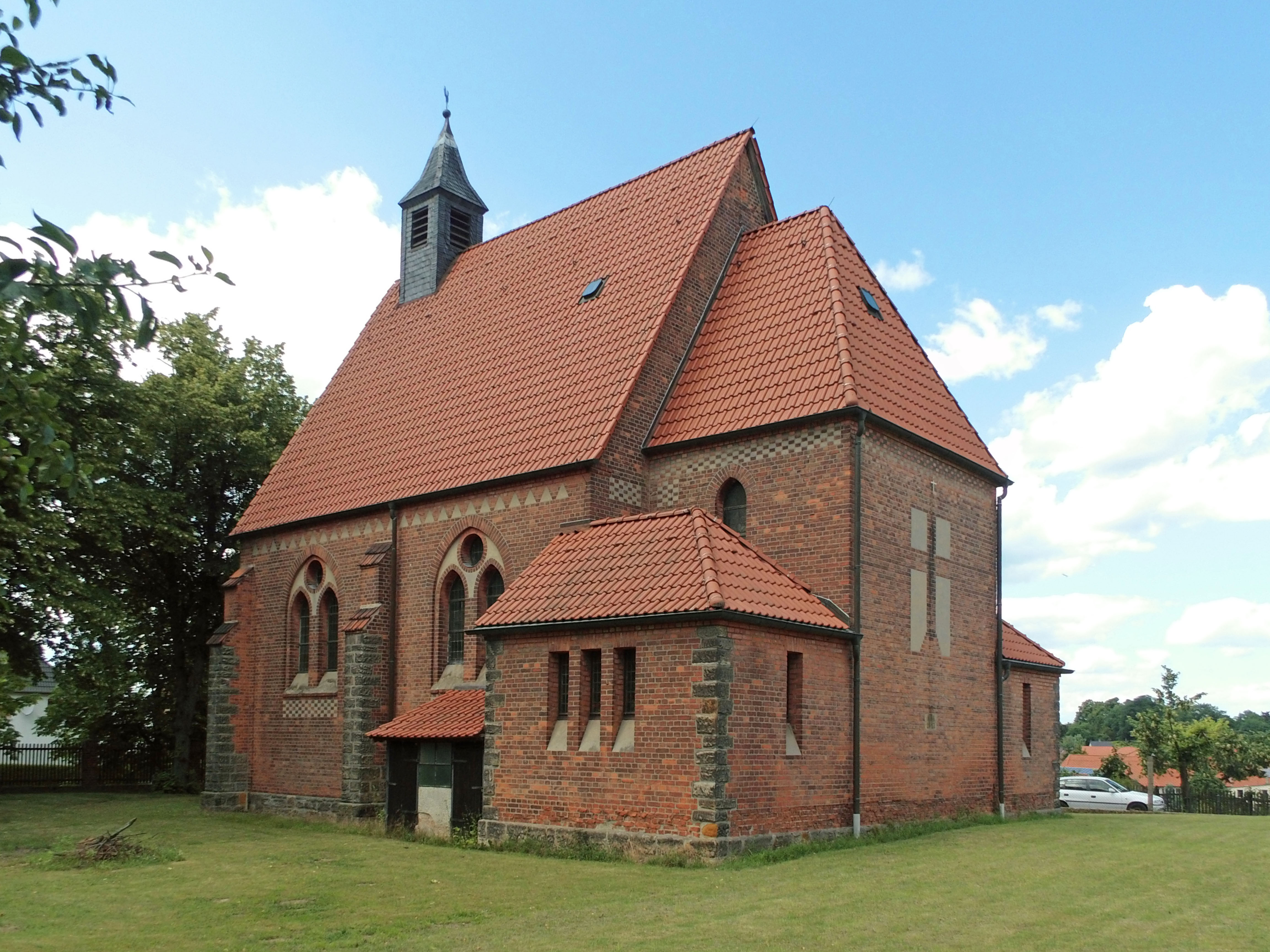 Katholische Kirche St. Josef in Harbke (Sachsen-Anhalt)